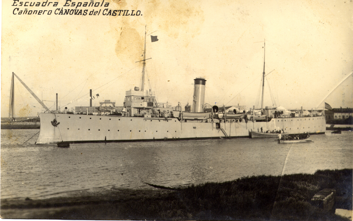 Le cannonier garde-côtes Canovas del Castillo de l'Armada espagnole, à l'ancre dans le port de Tenerife (1923).